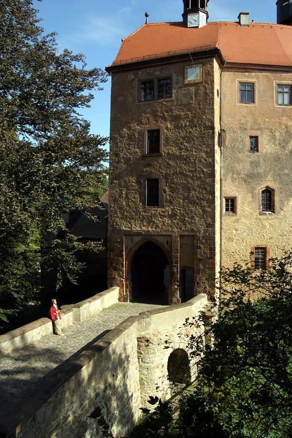 Zugang zur Burg Kriebstein (Sachsen) über den Halsgraben